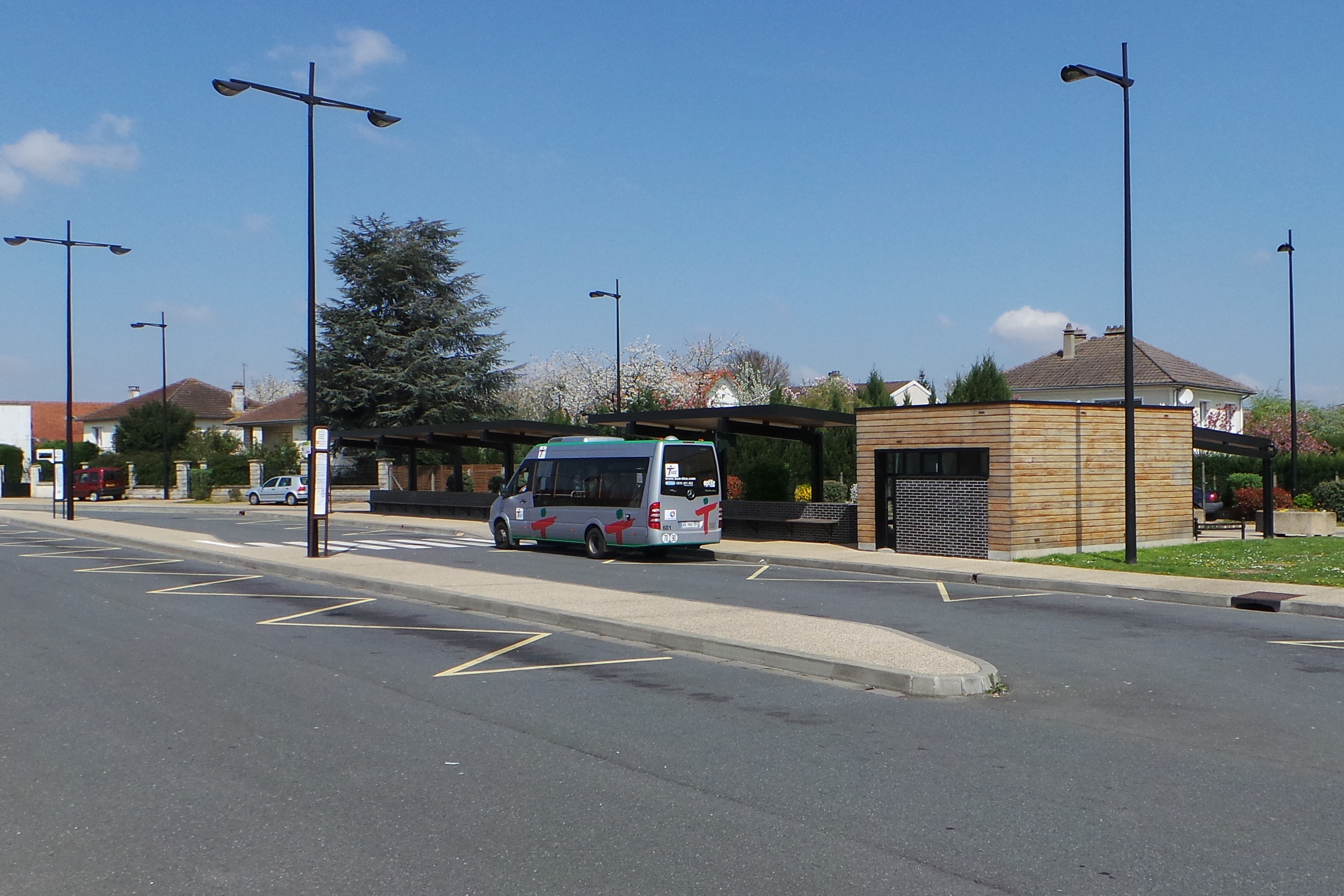 Terminal de bus David Douillet, Coudray-Montceaux, Essonne, France